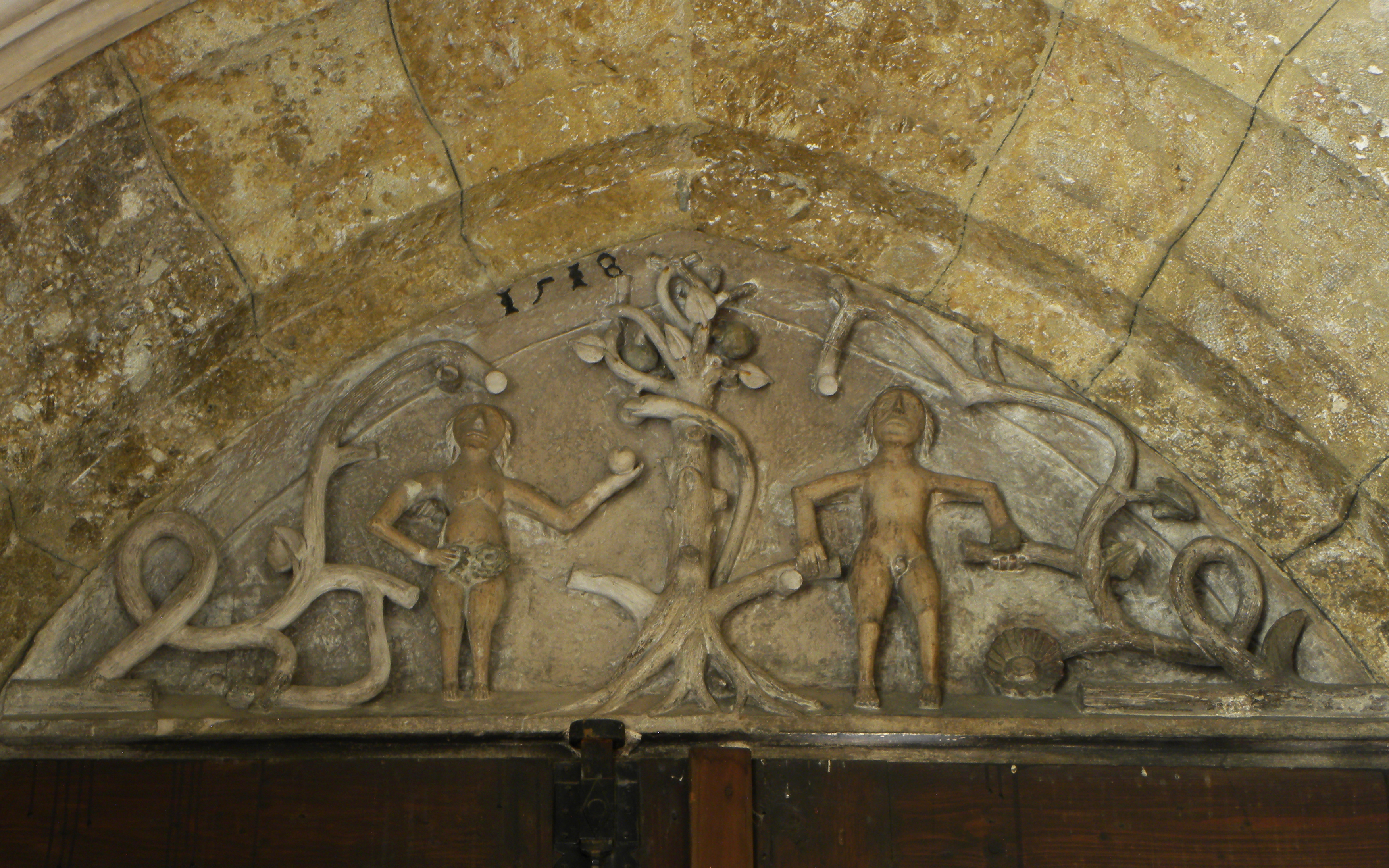 Tympanon mit Relief Sündenfall, innenseitig über dem Eingang der Pfarrkirche hl. Oswald